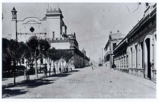 Reforma y Paseo Bravo, centro histórico de Puebla, y Penitenciaría del Estado, las casas a la derecha han desaparecido